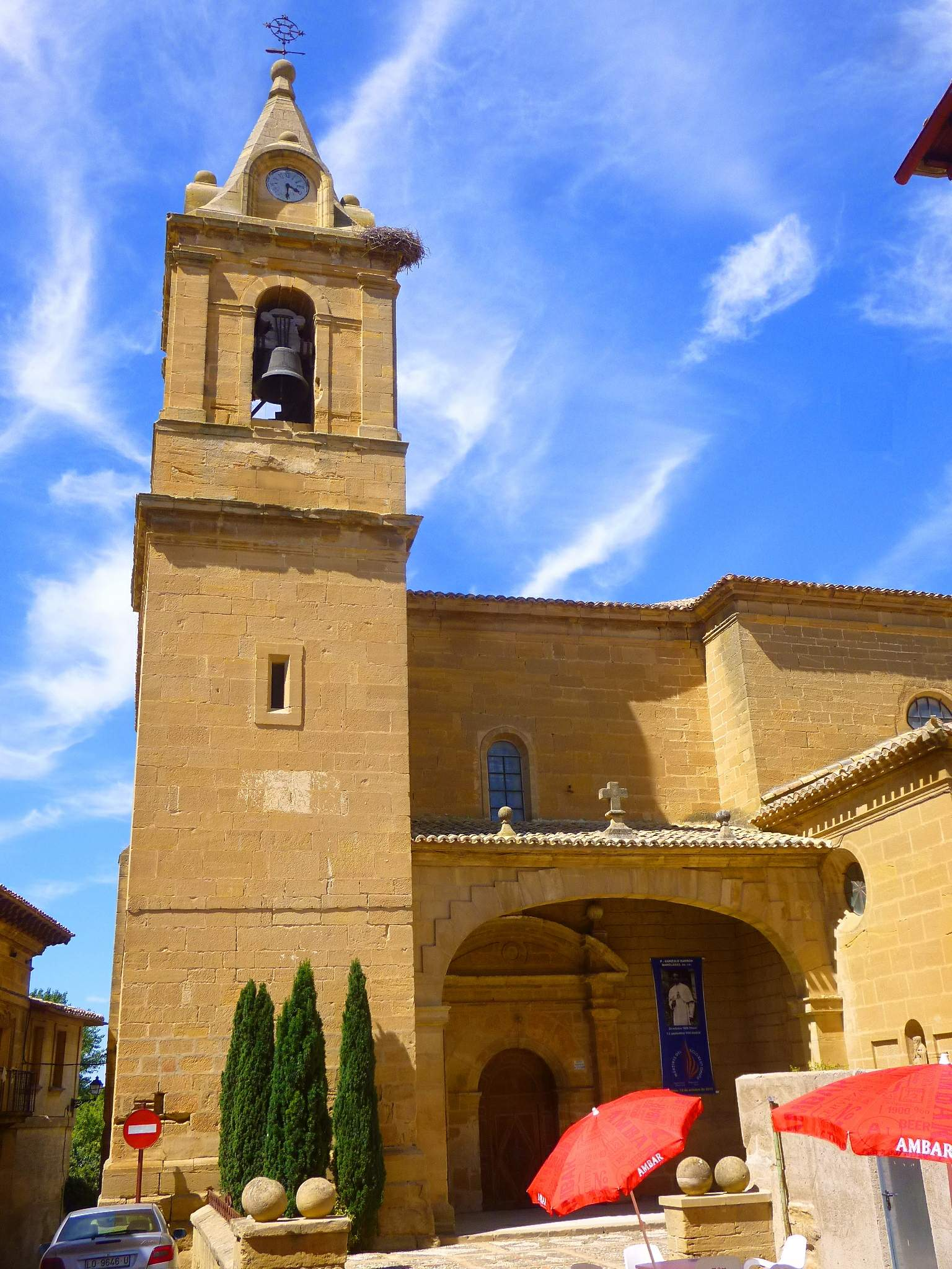 Iglesia de San Salvador (Ollauri, La Rioja, España)